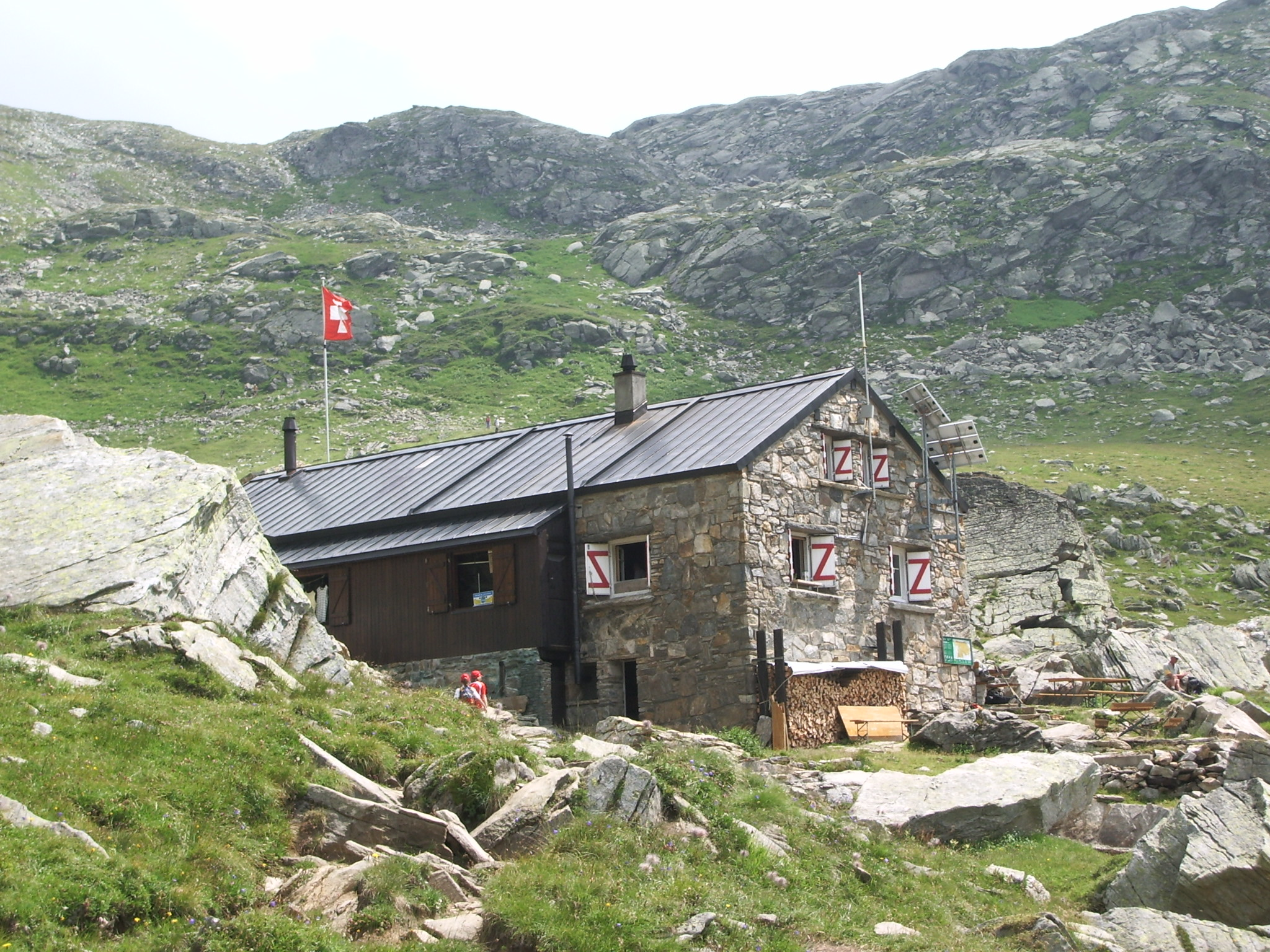 SAC Binntalhütte am Albrunpass im Binntal, Kanton Wallis, Schweiz Foto selbst aufgenommen im Sommer 2006: Während des Zweiten Weltkriegs wurde der Albrunpass wegen seiner strategischen Lage mit Befestigungen versehen. Unterhalb des Passes wurde ein Beobachtungsposten mit Unterkunft eingerichtet, der zur heutigen Binntalhütte umgebaut wurde. Die eigentliche Festung befand sich drei Kilometer vom Pass entfernt am Mittlenberg. Aus der damaligen Truppenunterkunft ist die Mittlenberghütte (2394 m ü. M.) entstanden.